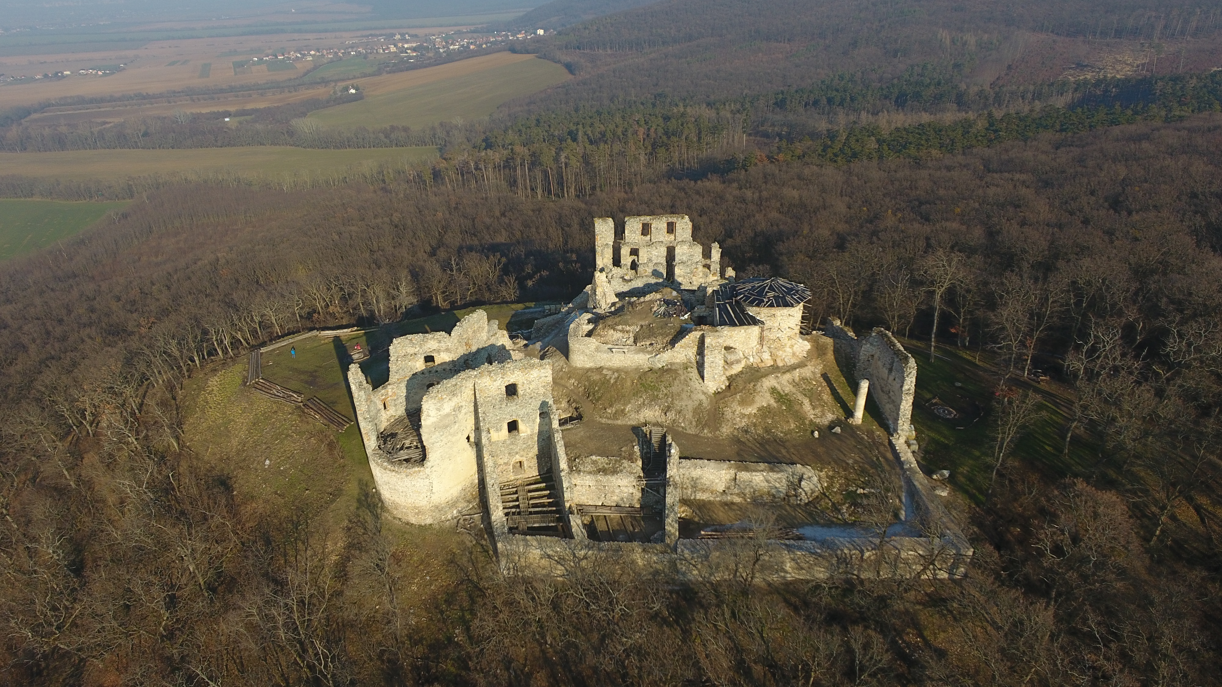 hrad Oponice